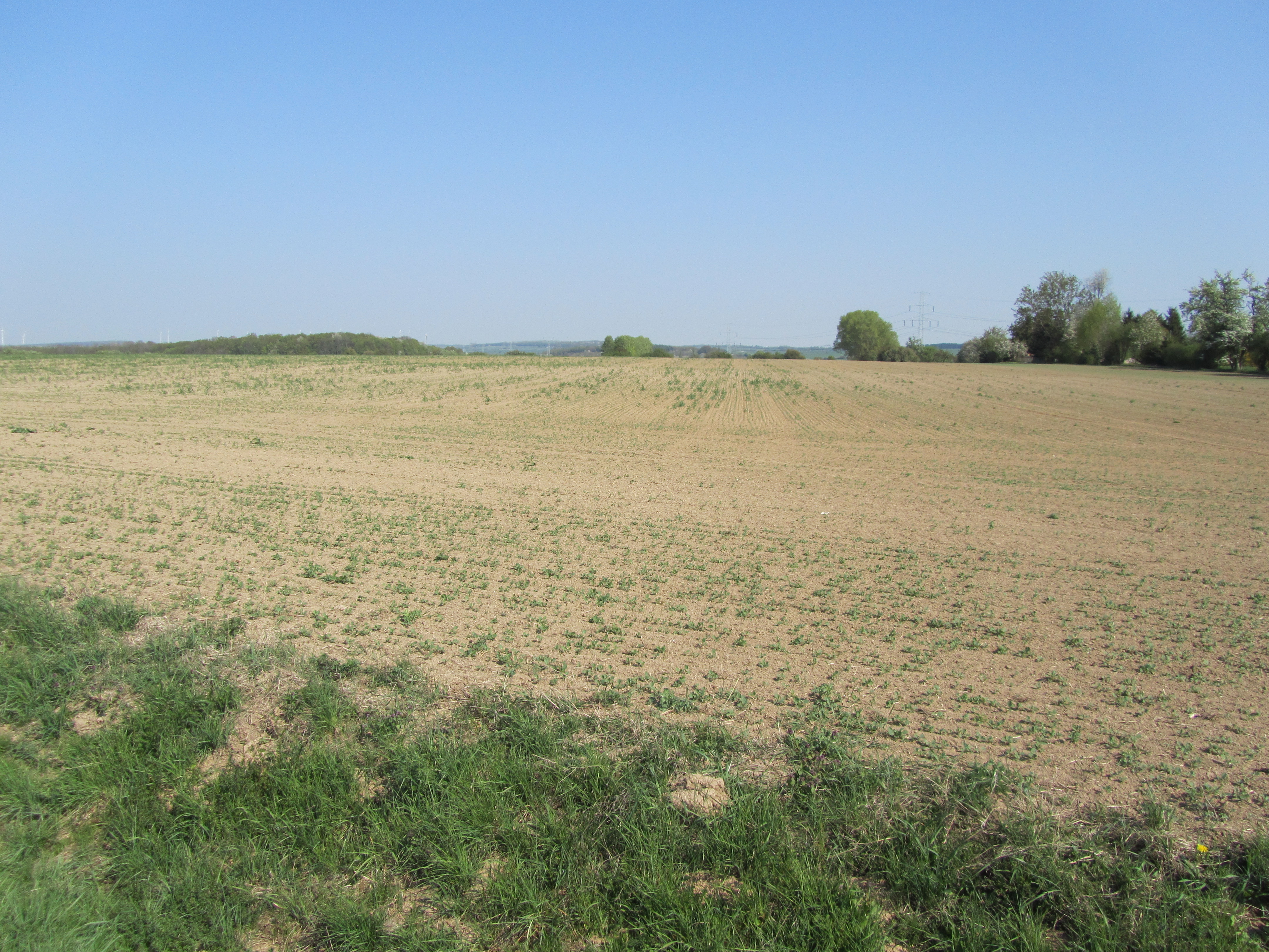 Ein verdürrtes Gemüsefeld im Frühjahr bei Schernberg (Thüringen).